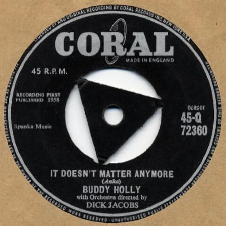 Es una foto del sencillo "It coesn't Matter Anymore", por Buddy Holly. Esta foto es del sencillo ingles, por Coral.